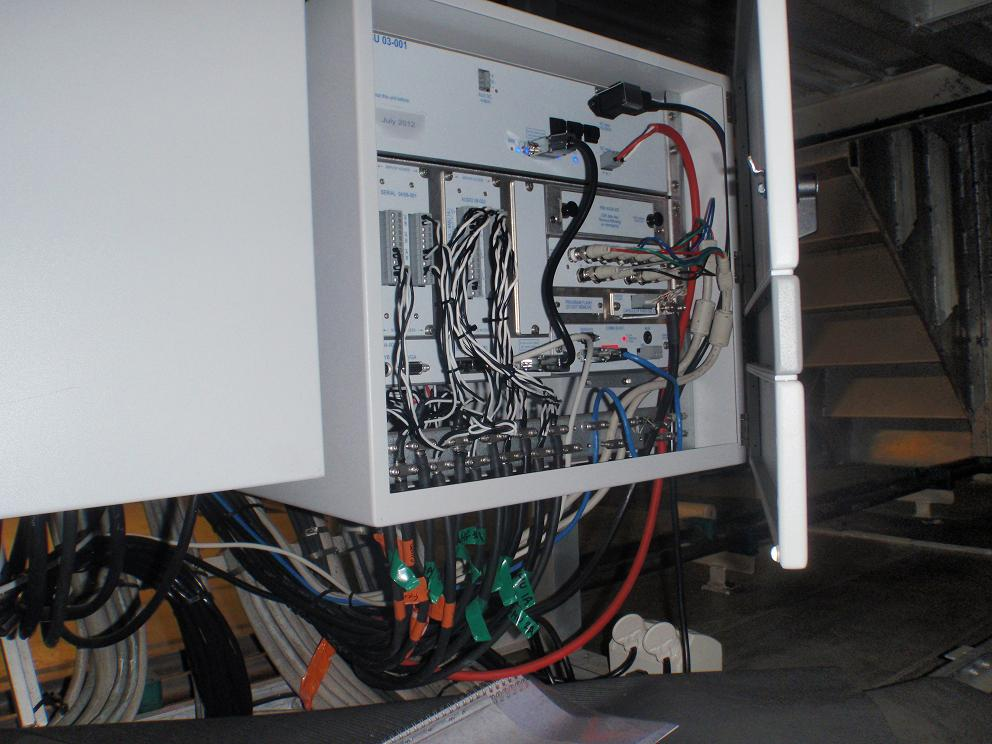 VDR - DAU data acquiqition unit